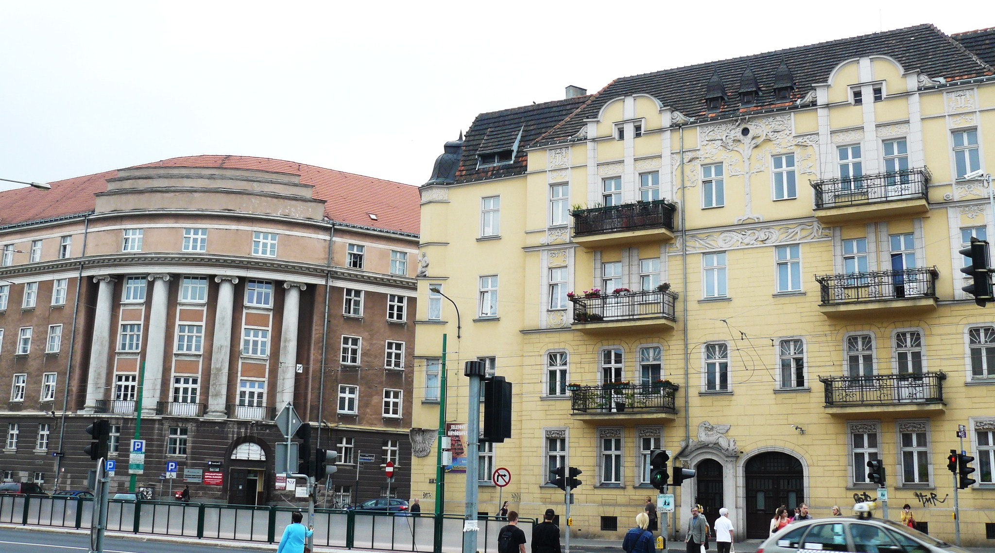 Poznań, ul. Grunwaldzka, d. Hotel Polonia.